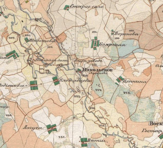 Фрагмент атласа Александра Ивановича Менде. Владимирская губерния. Село Никольское (Аргуново)